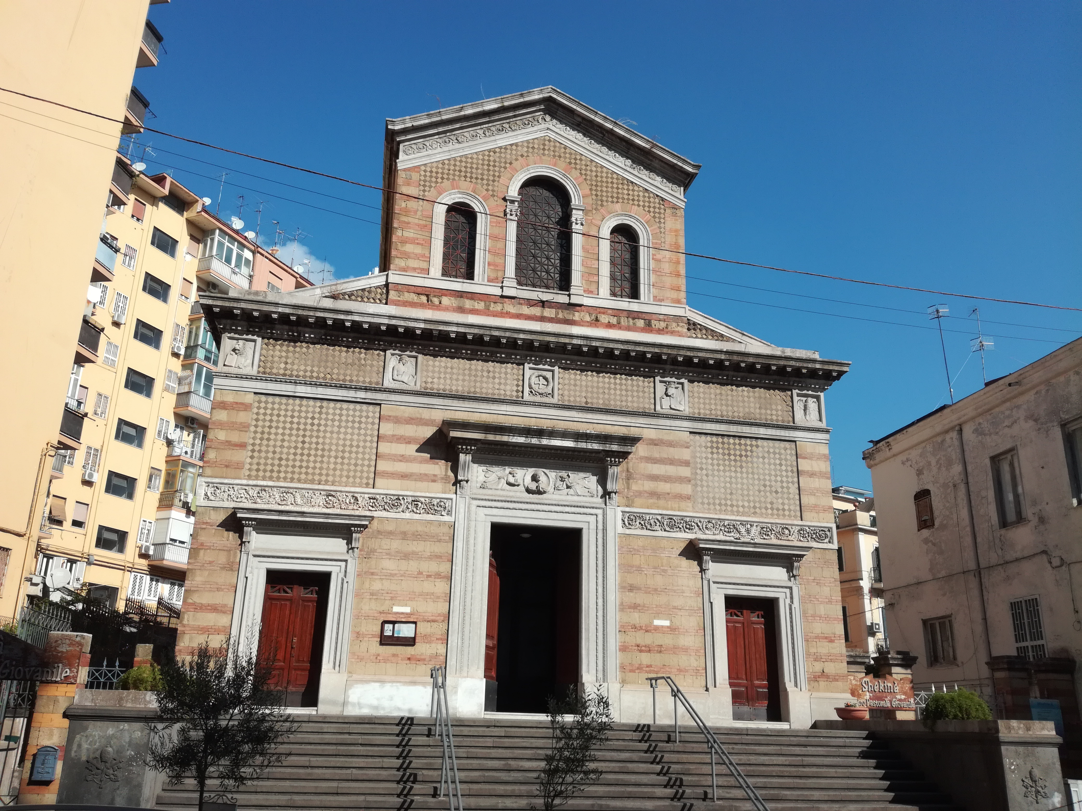 Facciata, San Gennaro ad Antignano, Napoli